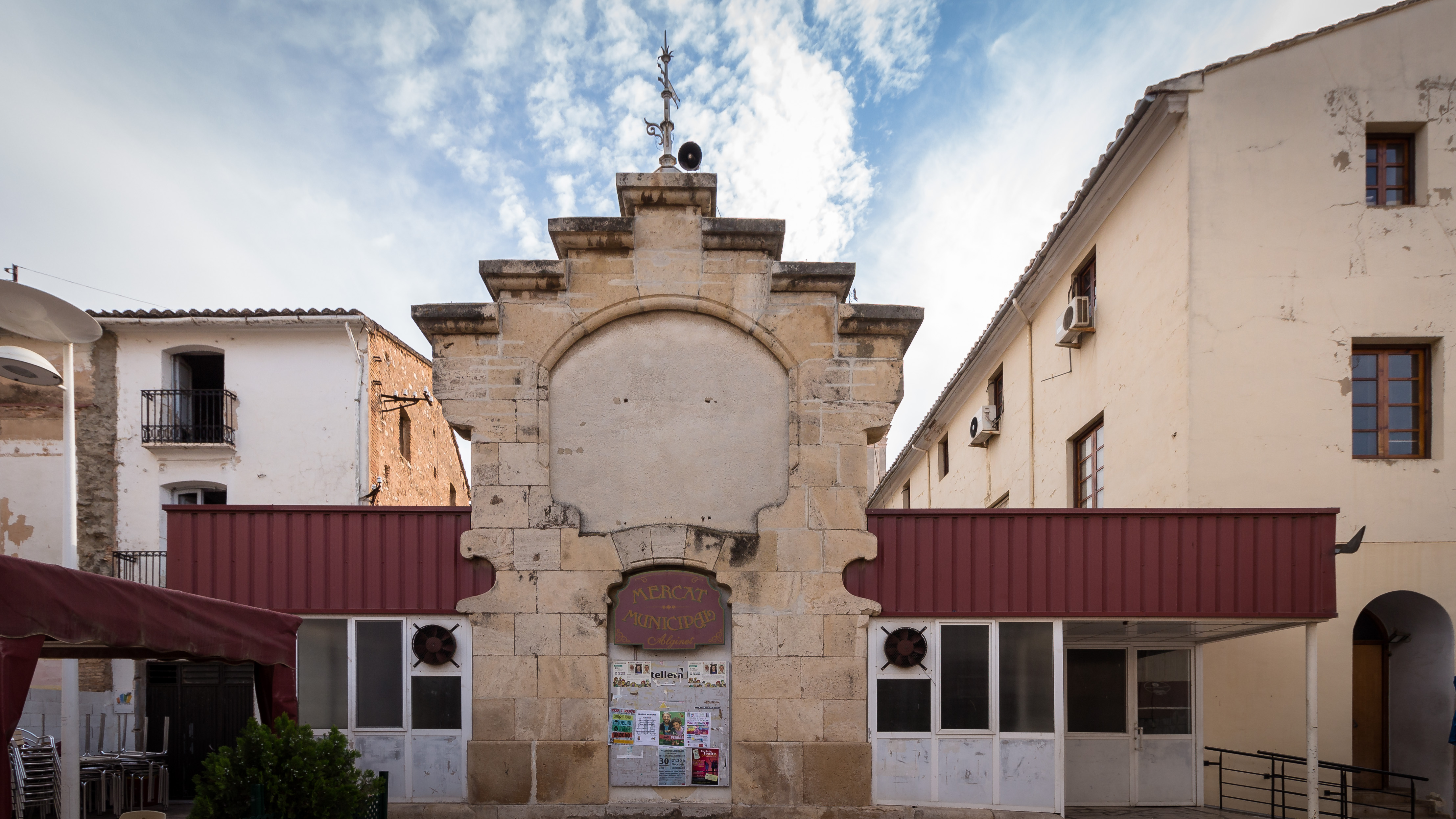 Mercado de Alginet 20.031-009.